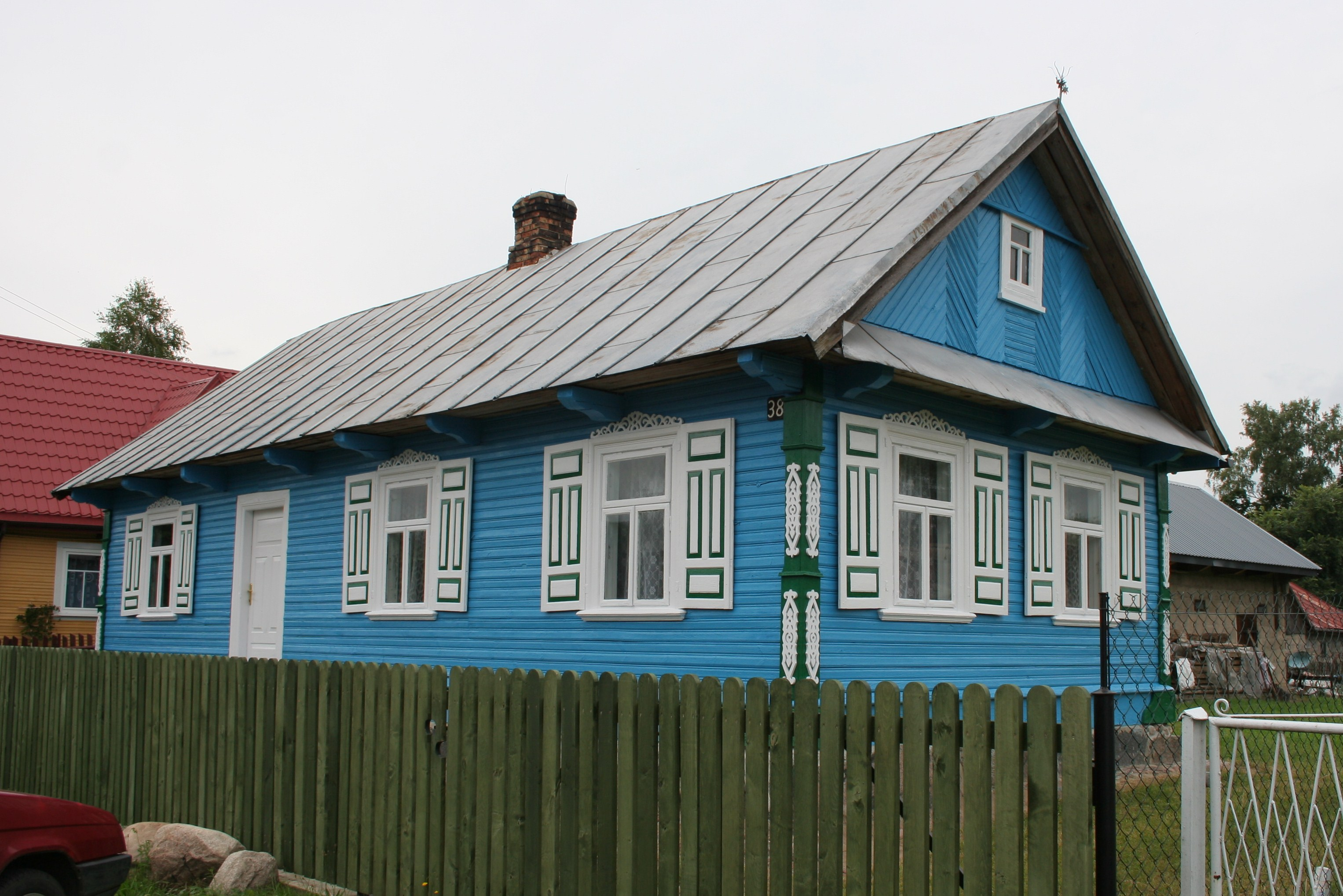 Dom mieszkalny w Parcewie.